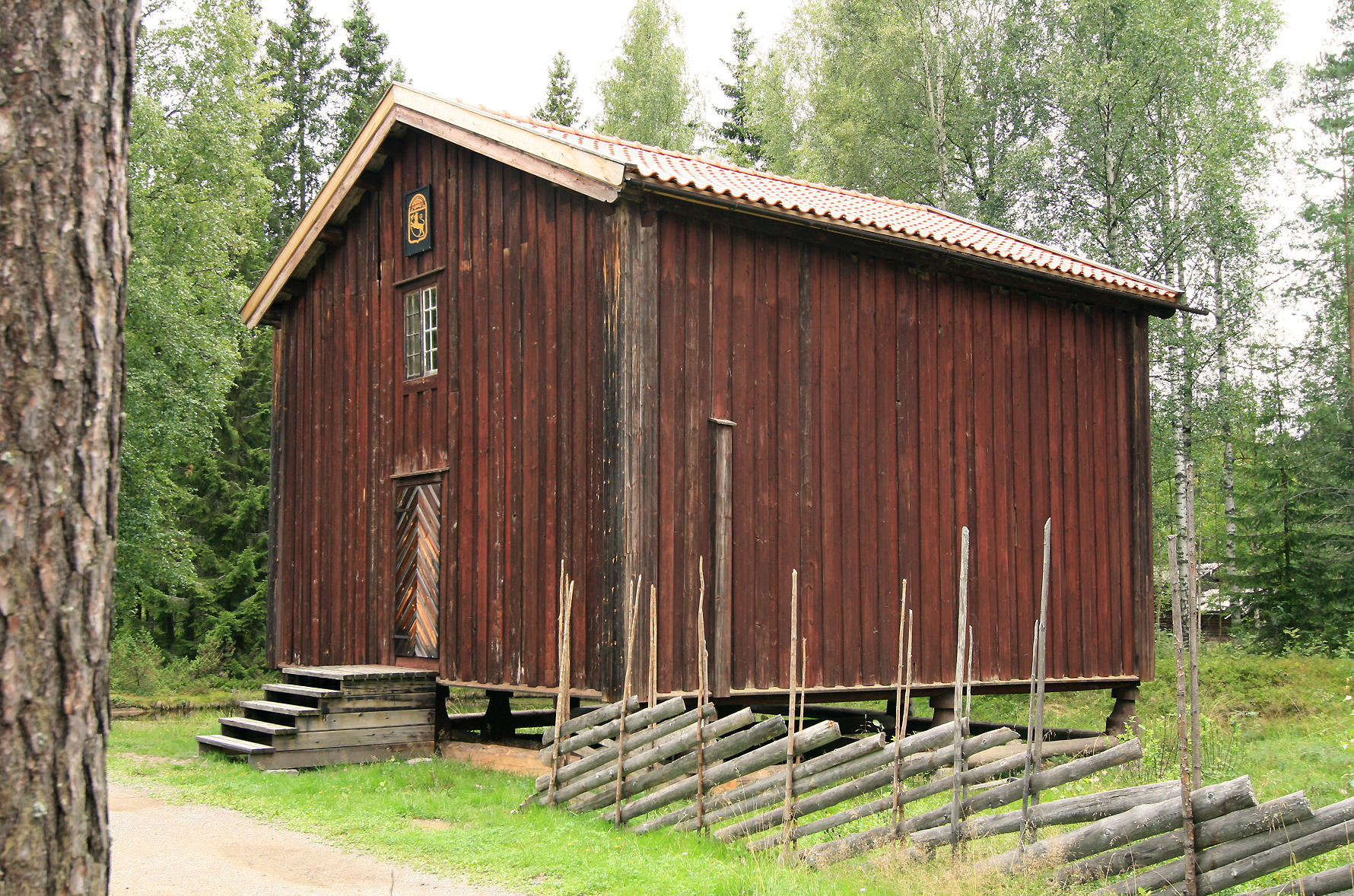 Telthus fra Terningmoen, Elverum. Bygd ca. 1790. I dag på Glomdalsmuseet.